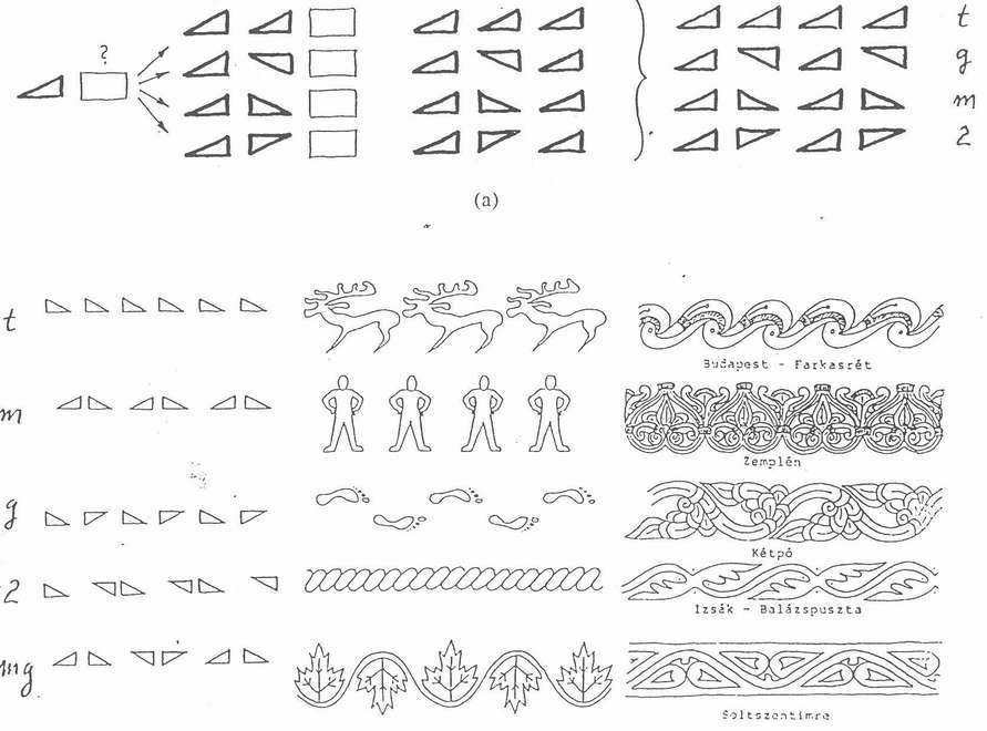 Az öt alapfríz szomszédsági művelettel előállított alapesete, természeti képe és Árpád-honfoglalás kori mintázata palmettás művészeti alkotásokon